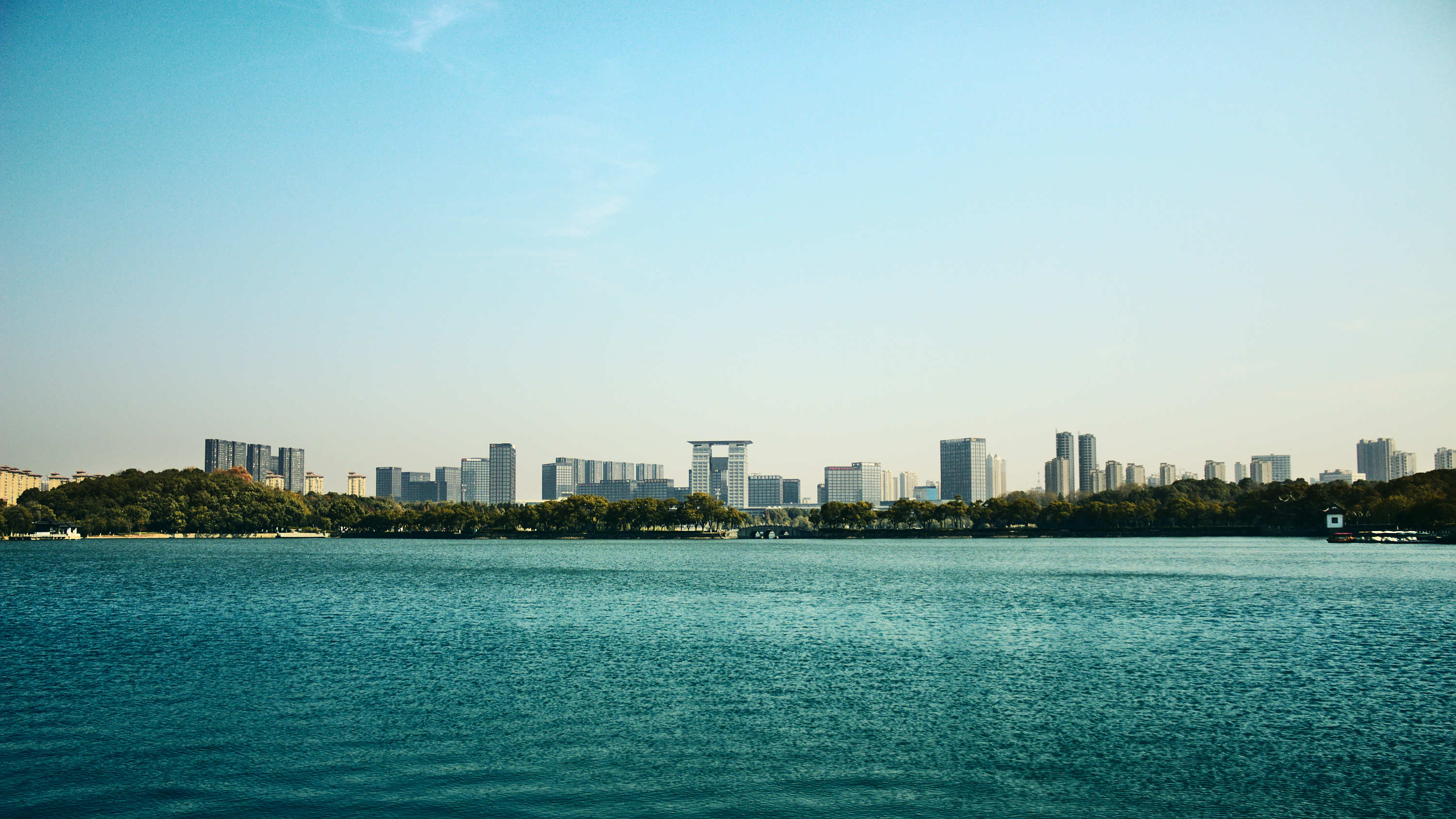 Tongling Tianjinghu, Anhui